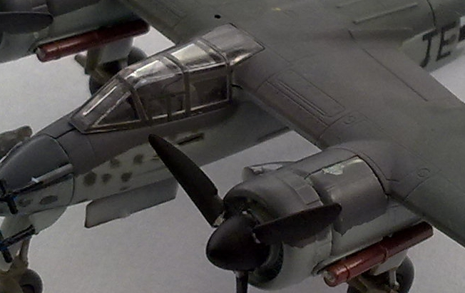 Detailansicht Cockpit Ta 154